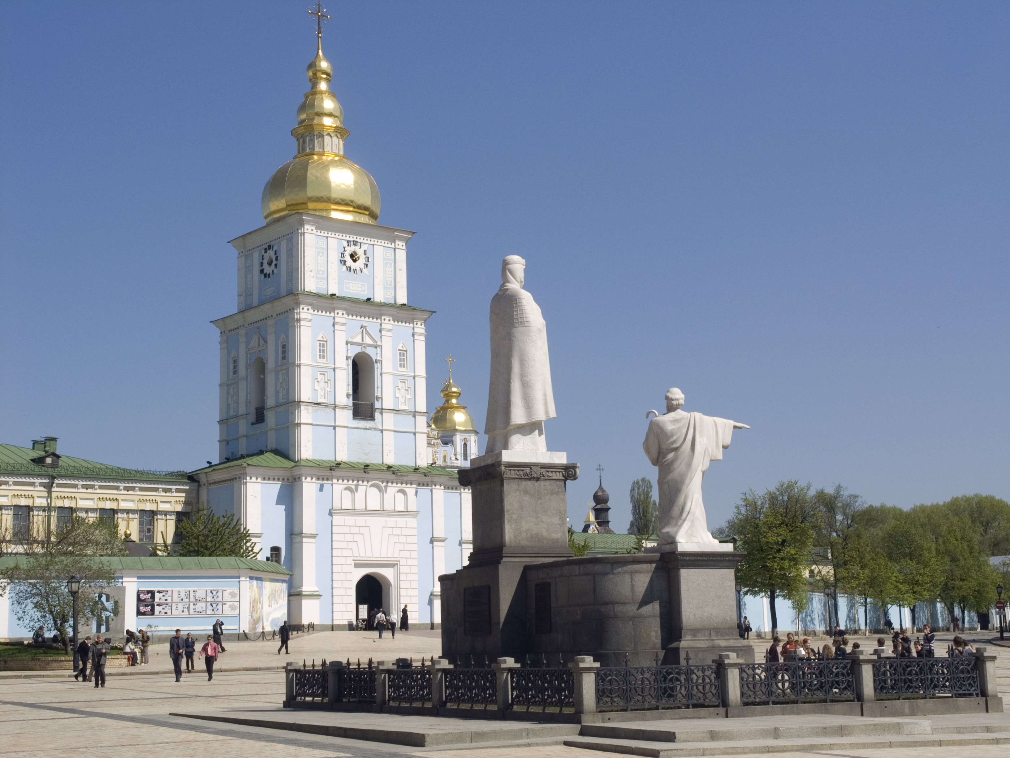 Україна, Київ - Пам'ятник княгині Ользі, святому апостолу Андрію Первозваному та просвітителям Кирилу і Мефодію